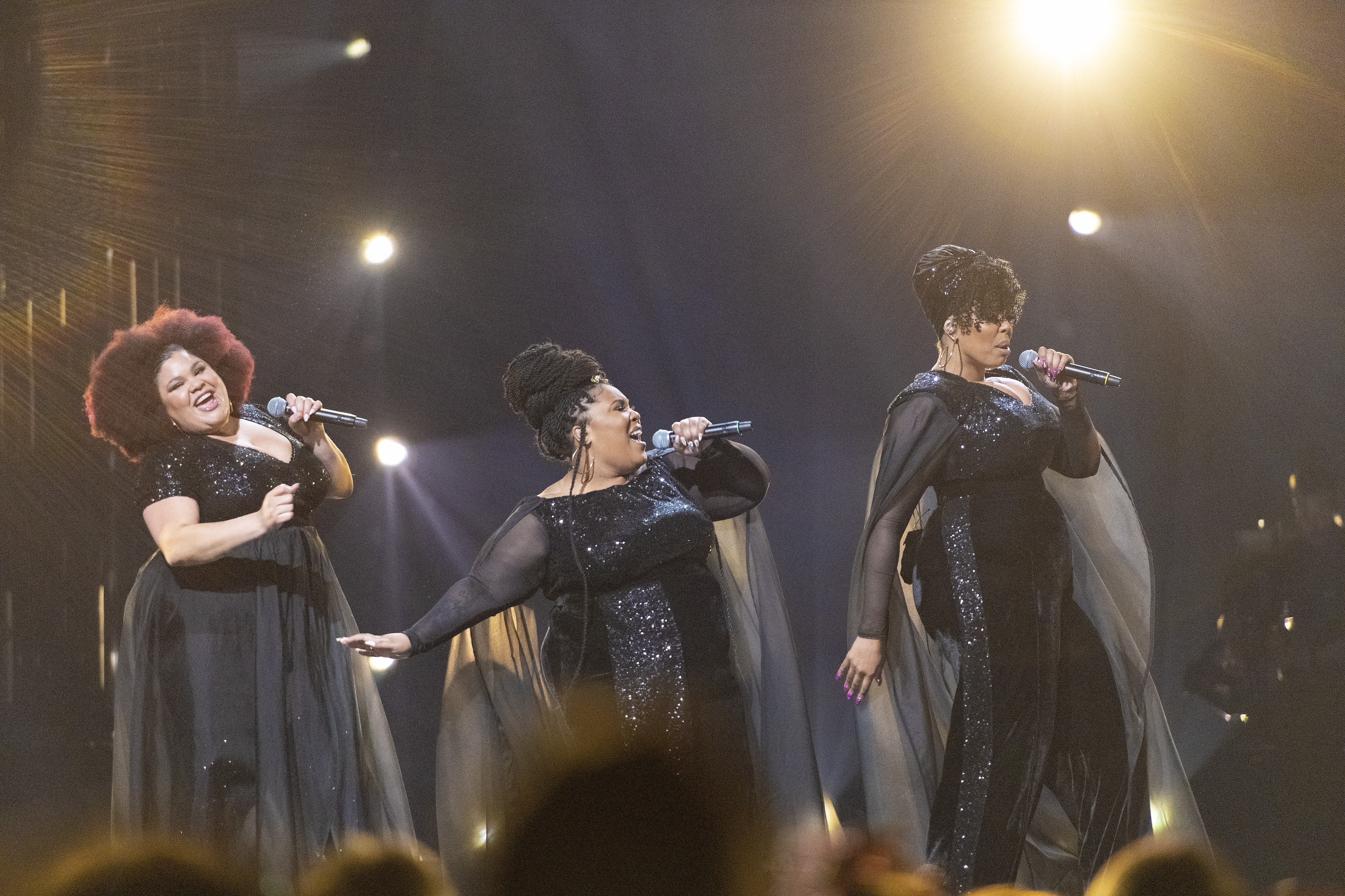 The Mamas Melodifestivalen 2020 Linköping genrep